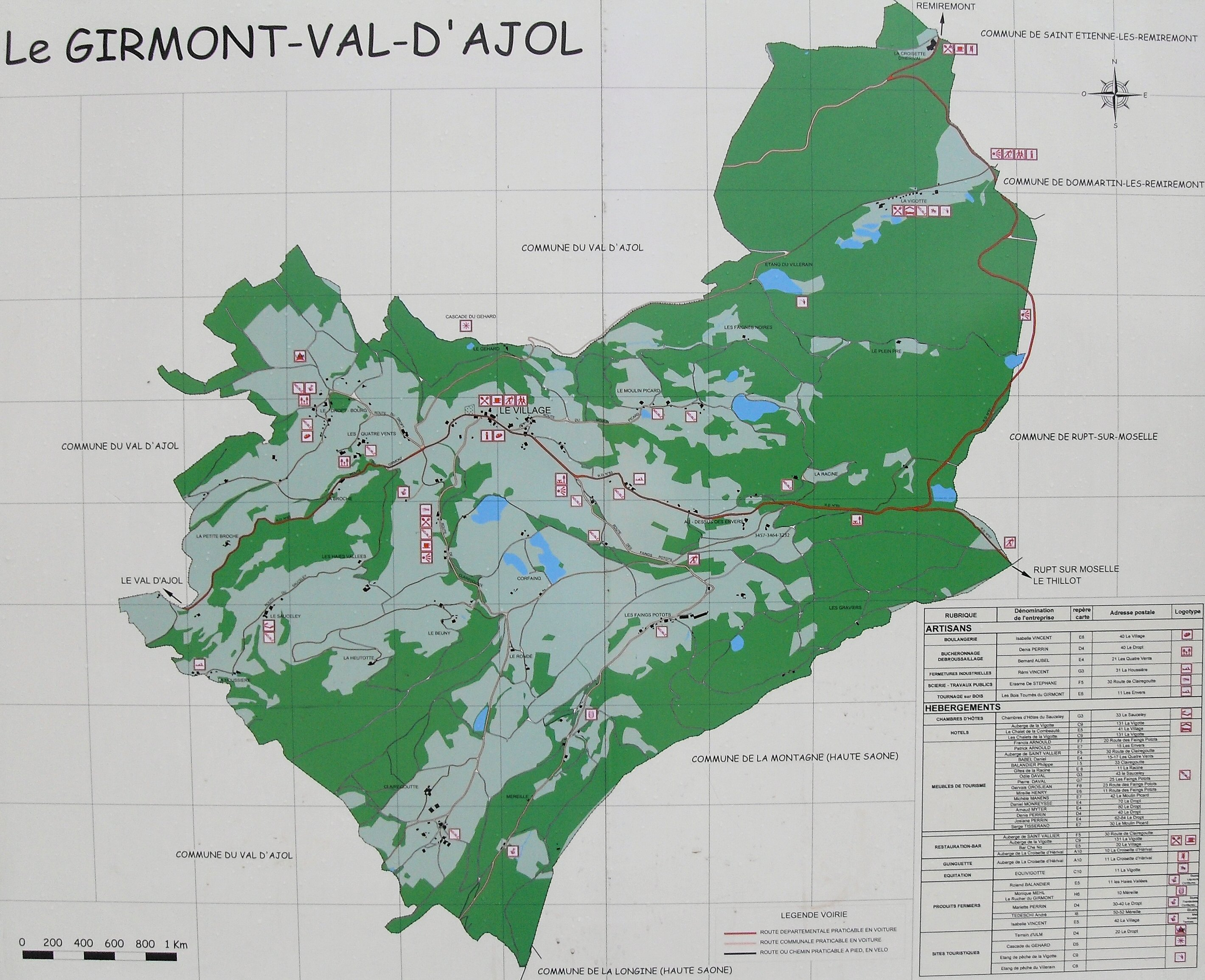 Plan de la ville Girmont-Val-d'Ajol